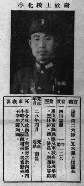 抗戰軍人忠烈錄第一輯中的烈士遺像